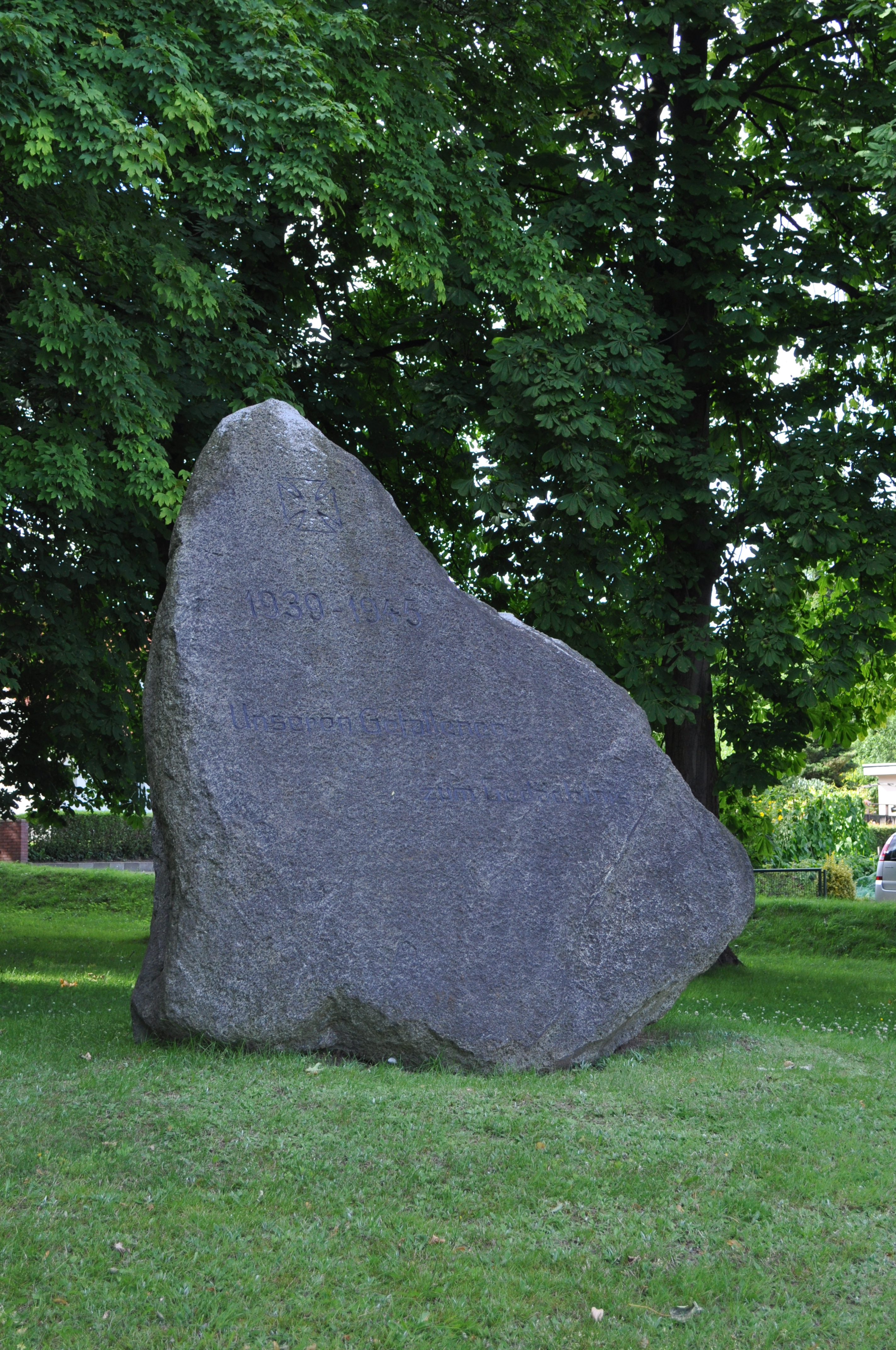 Denkmalanlage in Hemmoor-Westersode, Gedenkstein 1939-45. This is a photograph of an architectural monument. .202.200.004